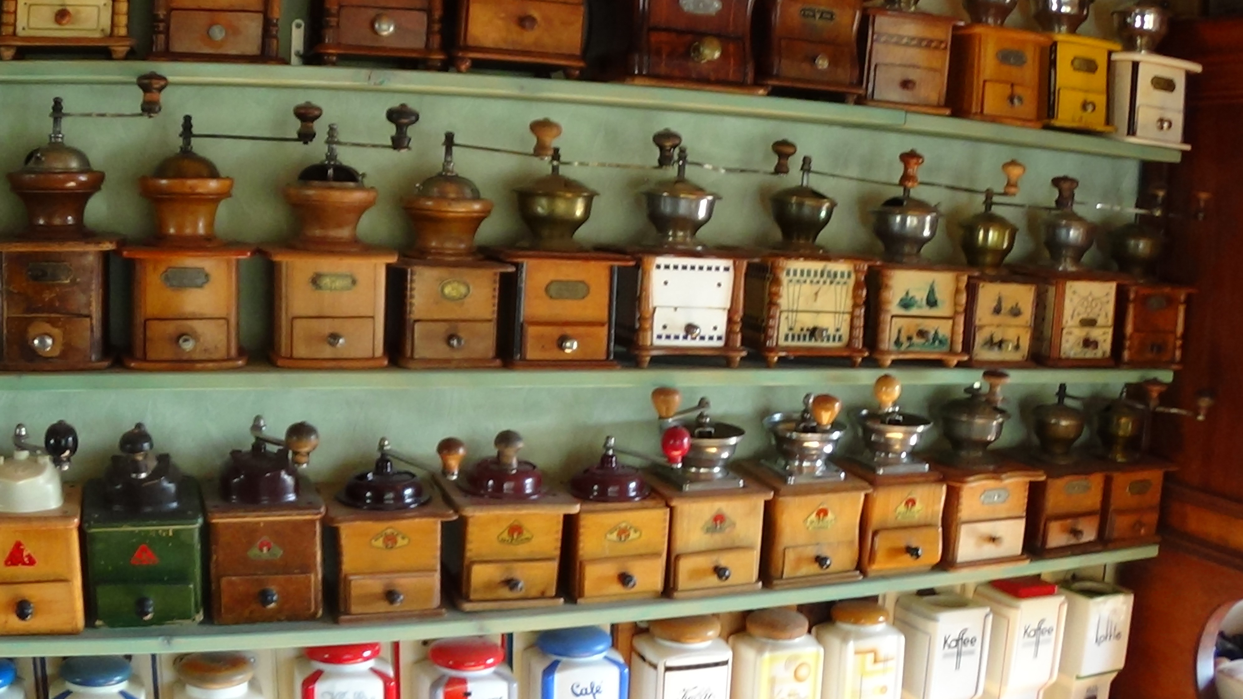 Cette image représente une partie de ma collection de moulins à café Peter Dienes ( 450 moulins )